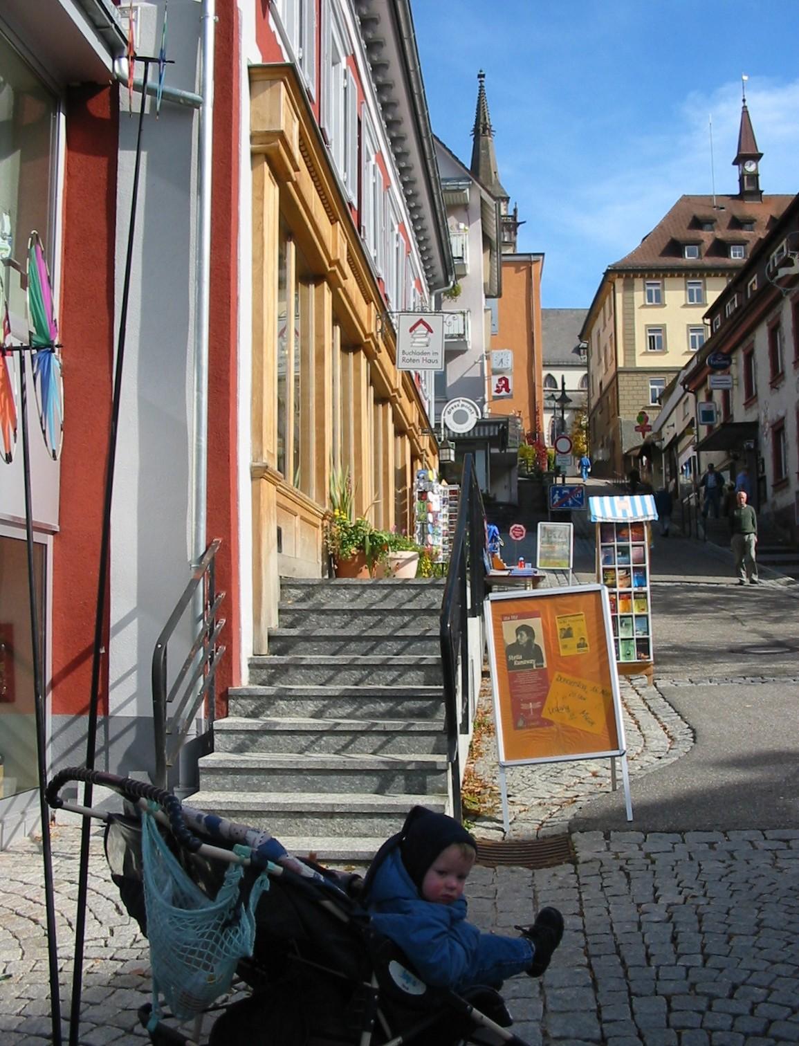 Titisee-Neustadt der Hirschenbuckel, Blick vom Roten Haus zum Rathaus.